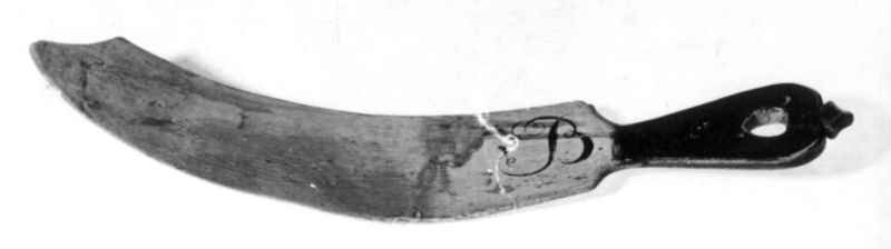 Rennefjøl eller siltre fra 1800-årene fra Ål i Buskerud, brukt til å skille fløten fra melken. Foto Norsk Folkemuseum, NF.1928-0430.